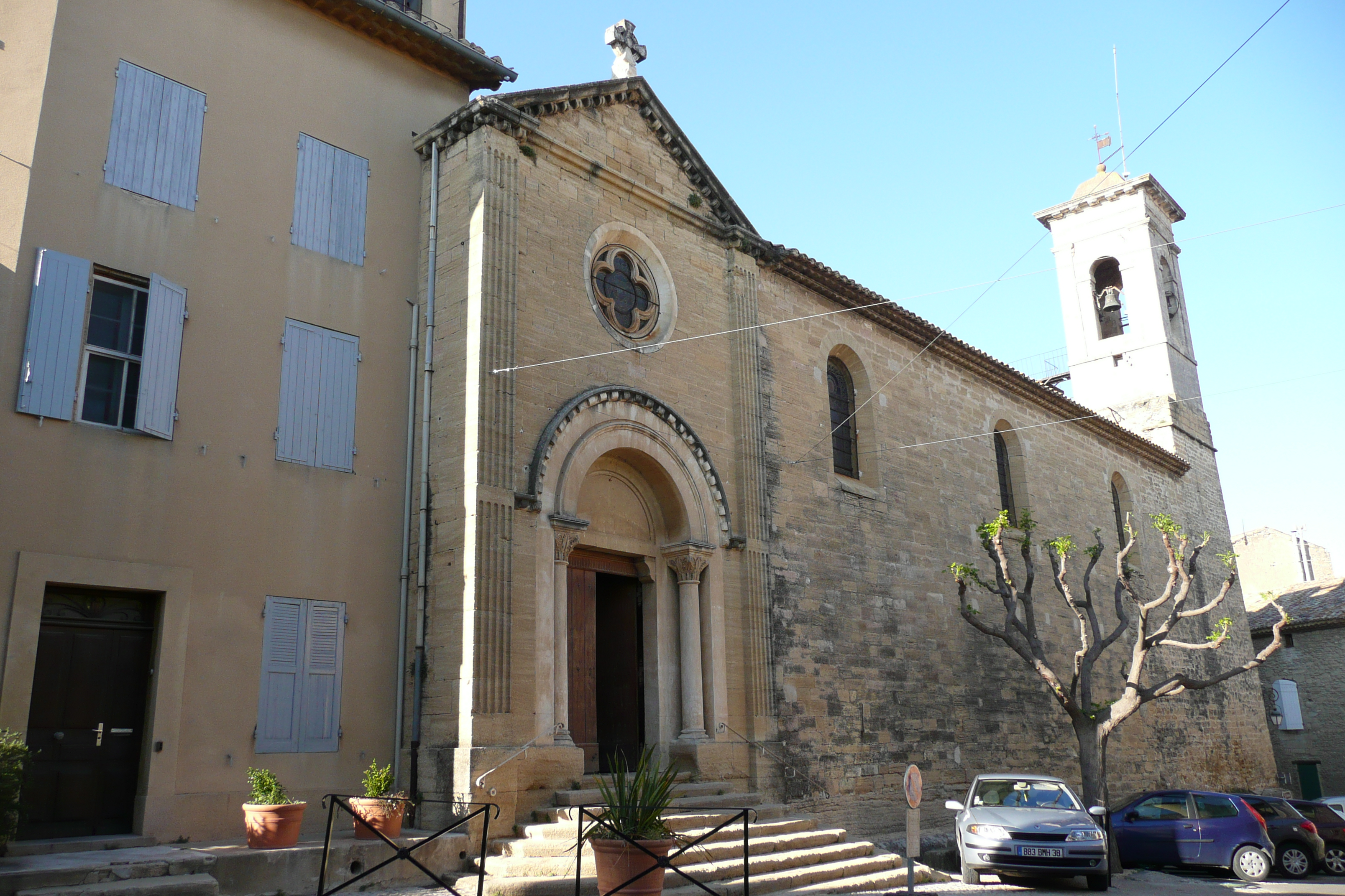 Eglise à Châteauneuf-du-Pape.